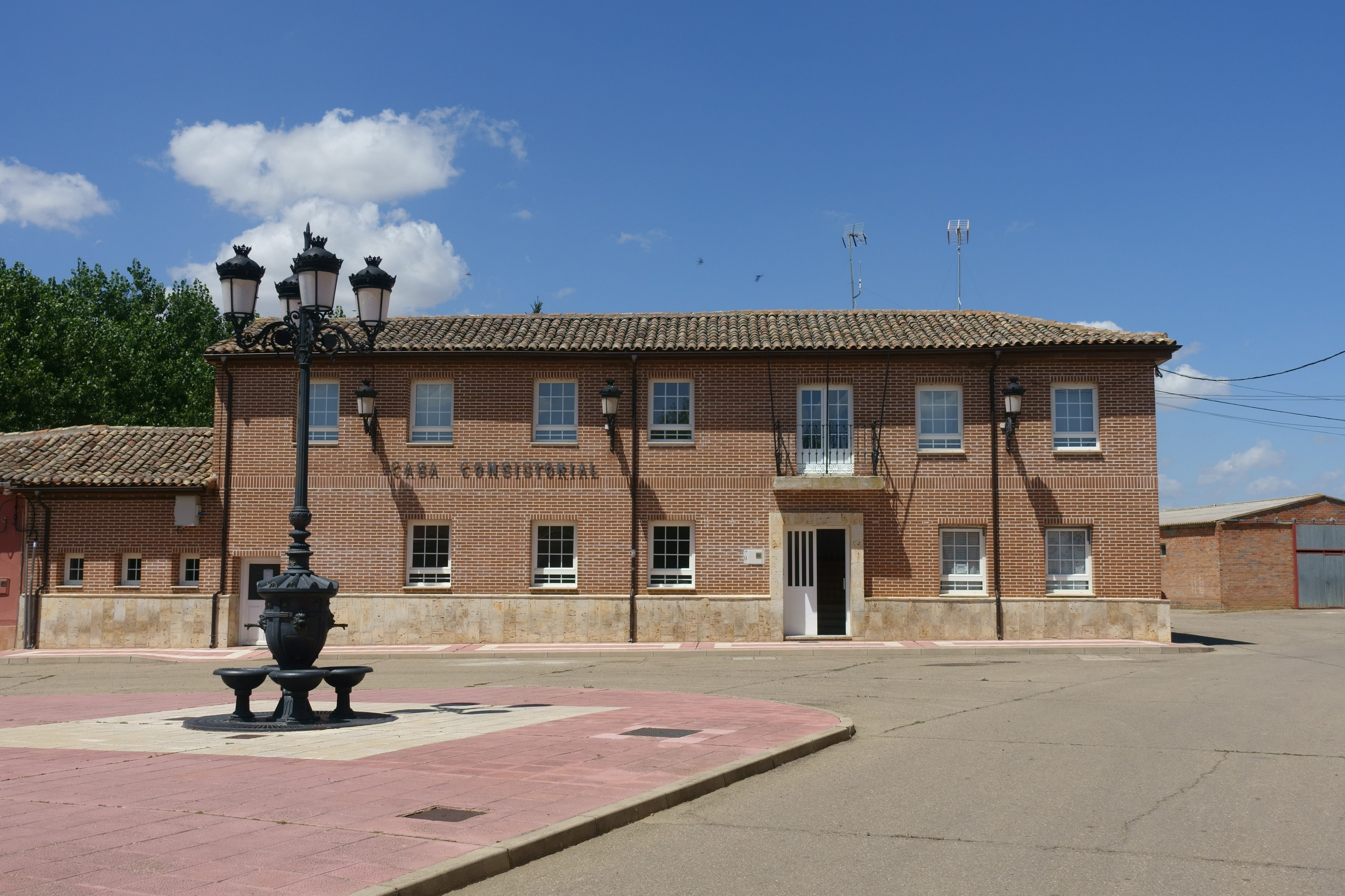 Casa consistorial de Manquillos (Palencia, España).